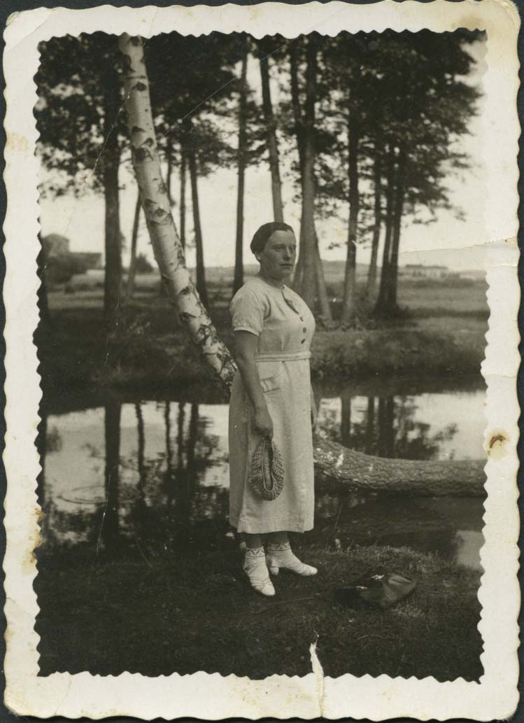 רקבה רגינה קוצ'ינסקי, תושבת דומביה שנספתה בשואה.